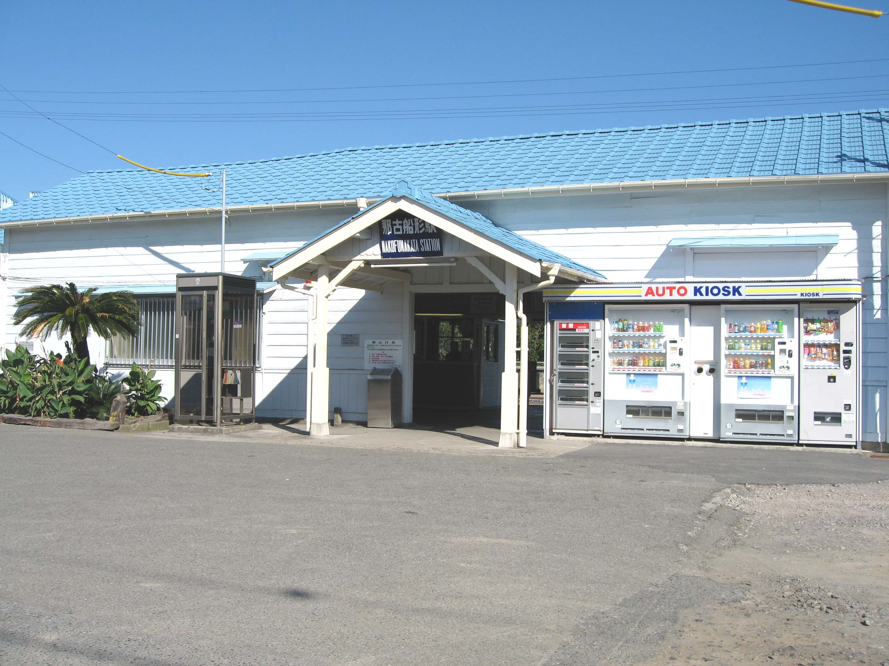 Nakofunakata station, Uchibo Line, Chiba, Japan, 那古船形駅駅舎